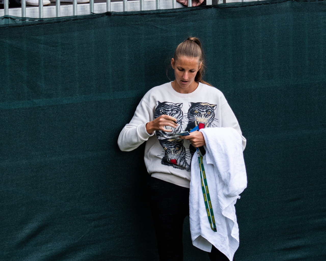 Karolina Pliskova